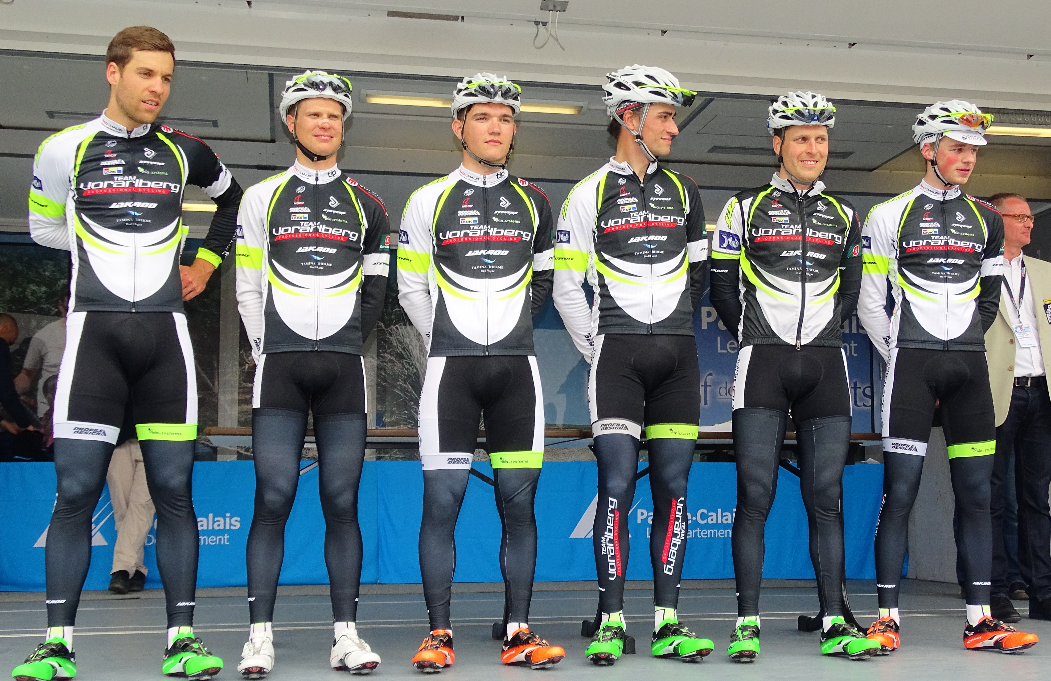 Reportage réalisé le samedi 23 mai 2015 à l'occasion du départ de la deuxième étape du Paris-Arras Tour 2015 à Ficheux, Pas-de-Calais, Nord-Pas-de-Calais, France.